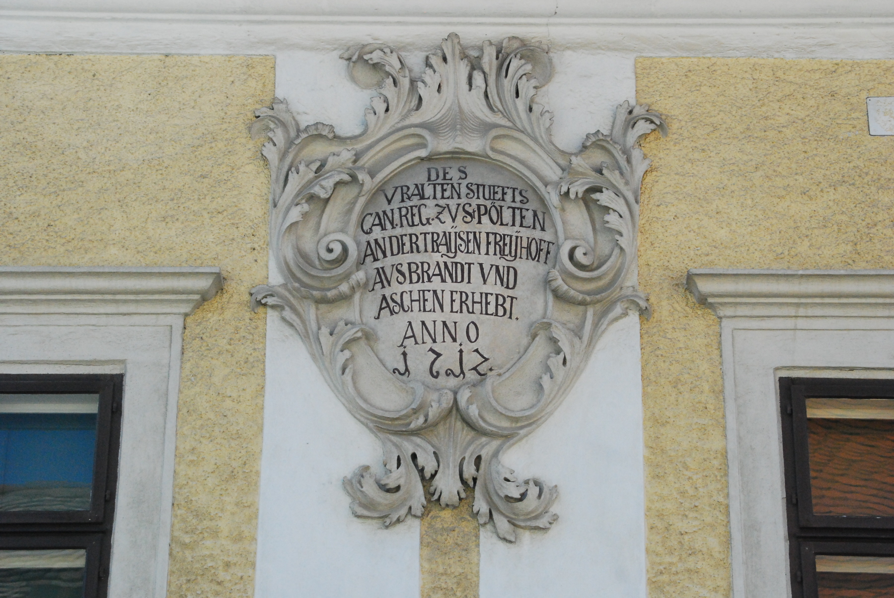 Eine Kartusche auf dem Pöltingerhof in Pulkau in Niederösterreich